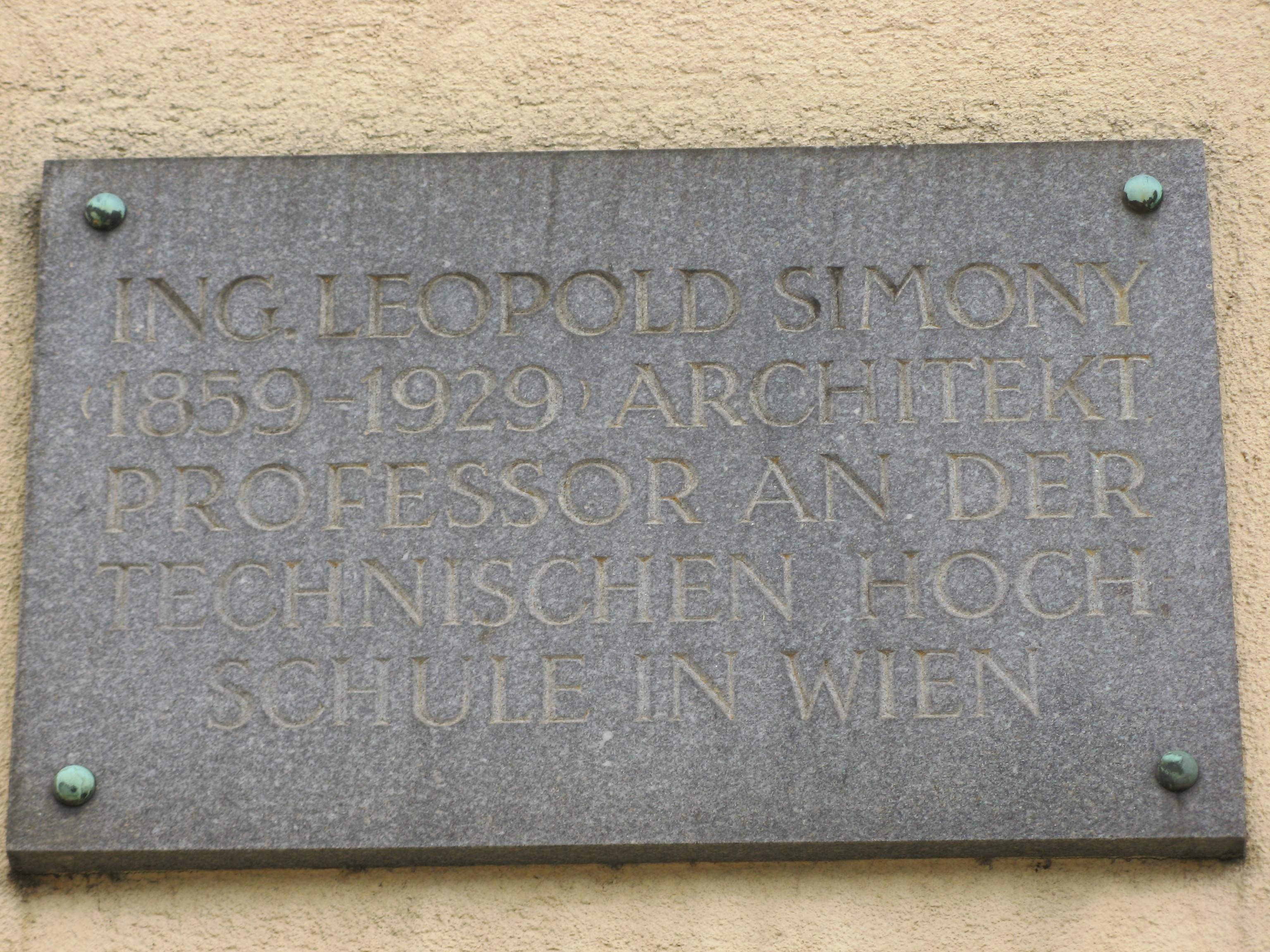 Gedenktafel für Leopold Simony im Simonyhof in Wien-Meidling